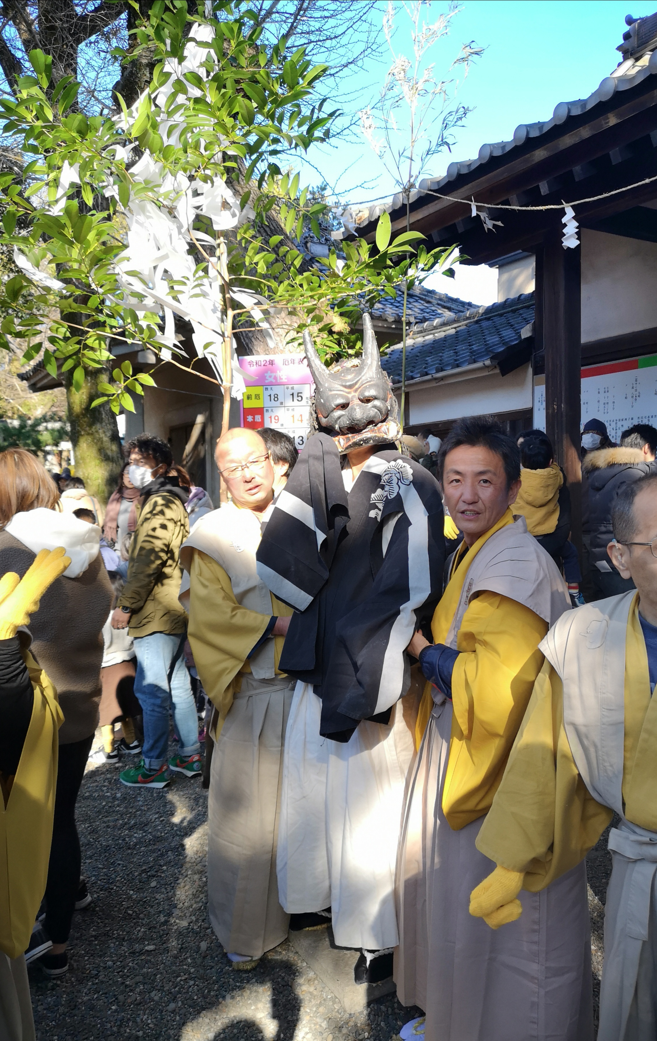 愛知県豊橋市の安久美神戸神明社の例祭「鬼祭」の黒鬼。大榊を従える。